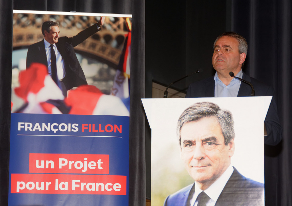 Grand meeting de soutien à François Fillon, à la salle des fêtes de Belfort, le 05 avril 2017, en présence de Xavier Bertrand (président de la région Hauts-de France et ancien ministre). Cette venue est organisée à l'occasion de l'élection présidentielle qui aura lieu les 23 avril et 07 mai 2017. Cet événement en images : de soutien à Fran...